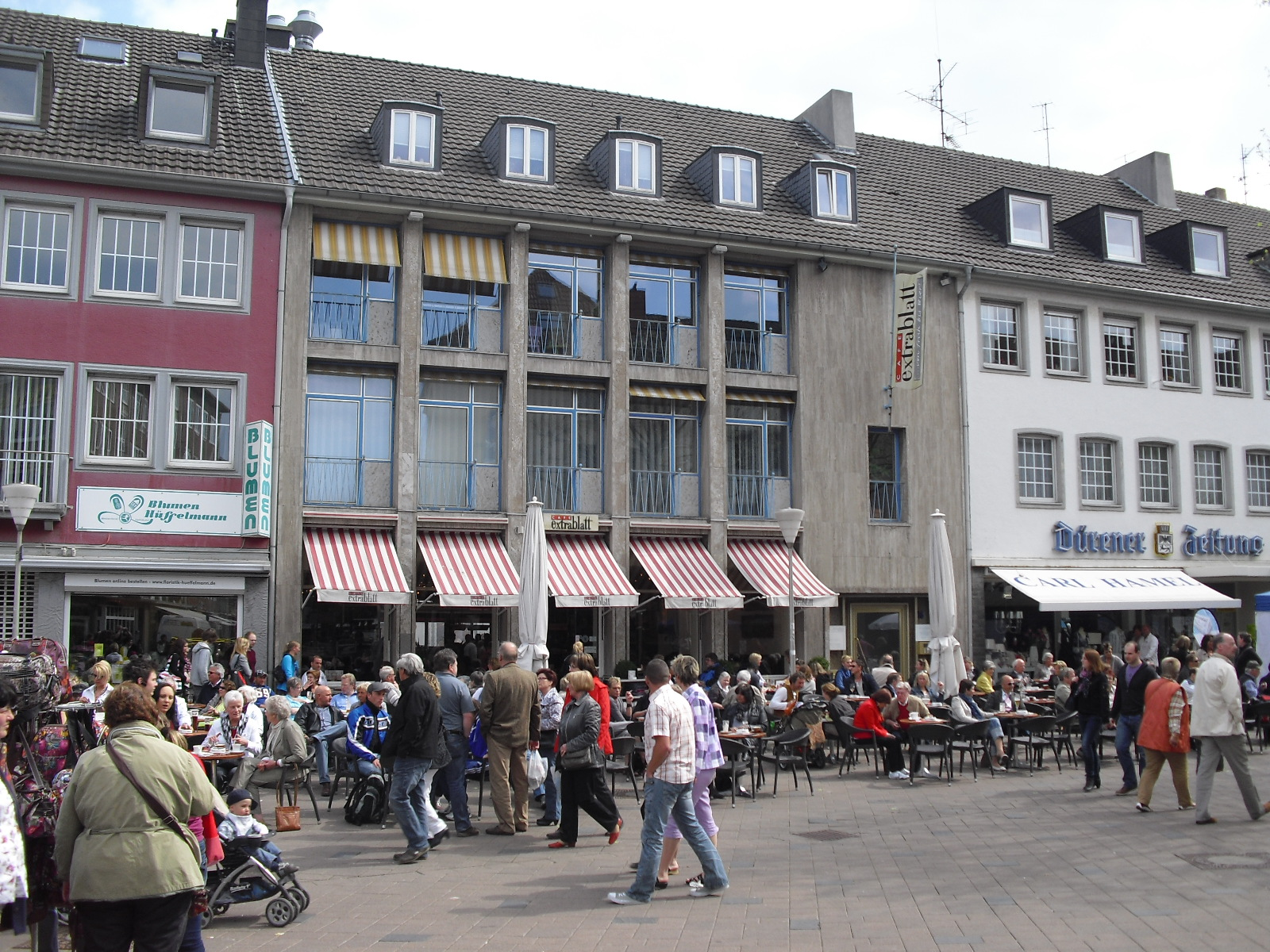 Das ehemalige belgische Offizierskasiono Markt 16 in Düren